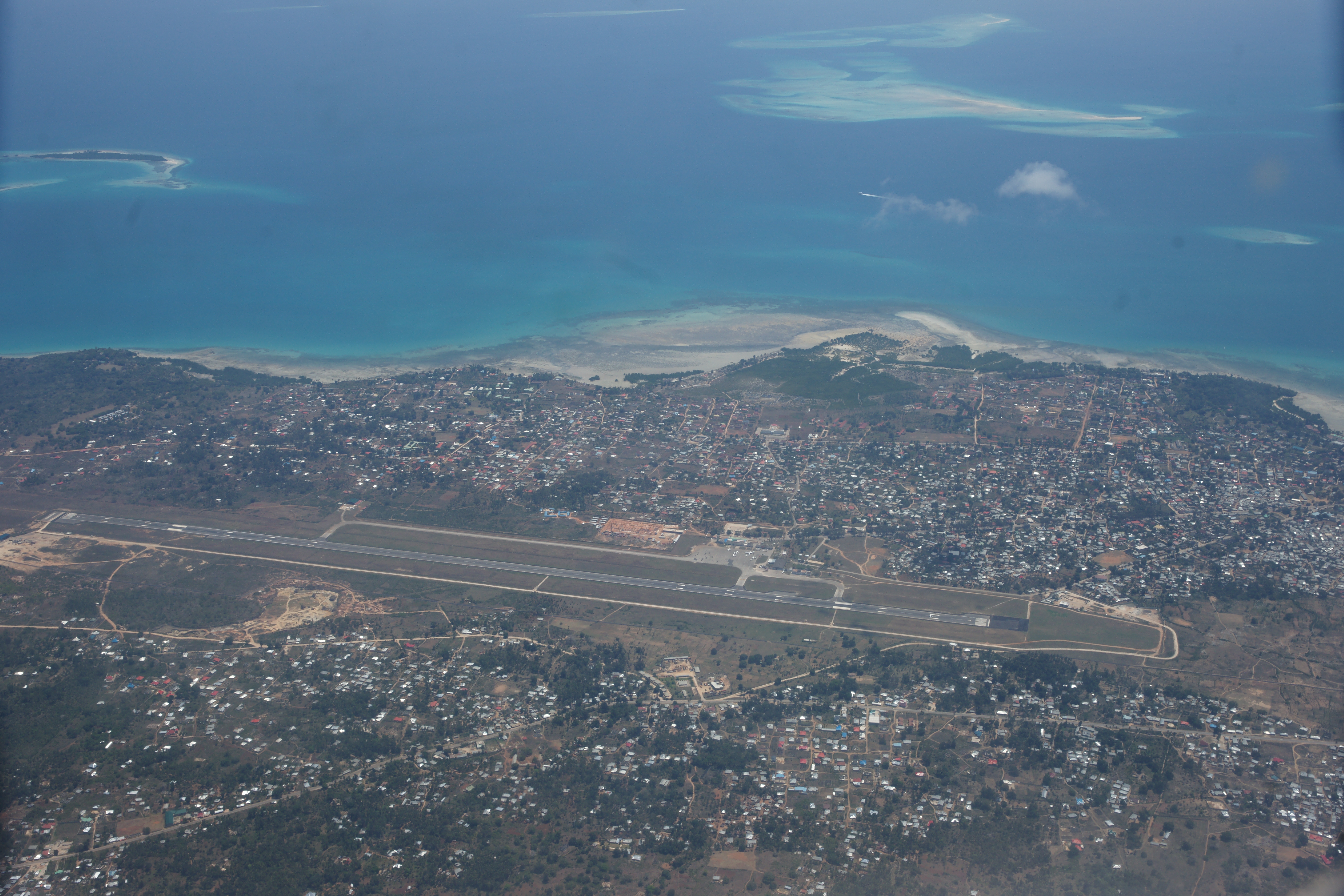 DSC00045 (3)